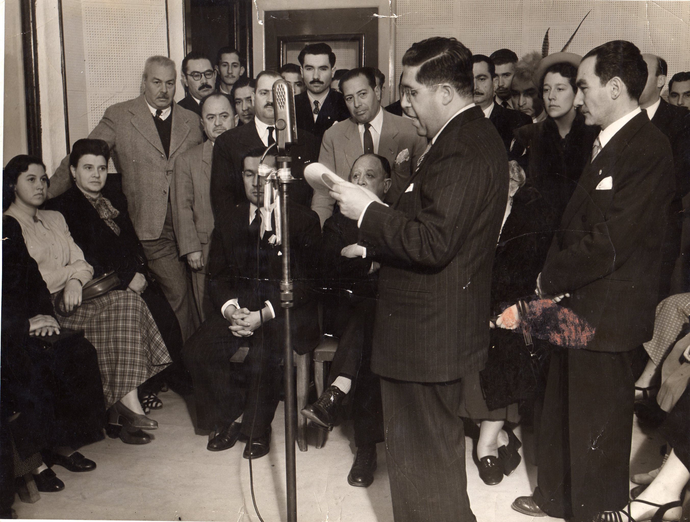 José Lo Giúdice, época en que fue director de la emisora oficial L.V.9 Radio Provincia de Salta. Se encuentra de perfil, justo atrás del locutor.